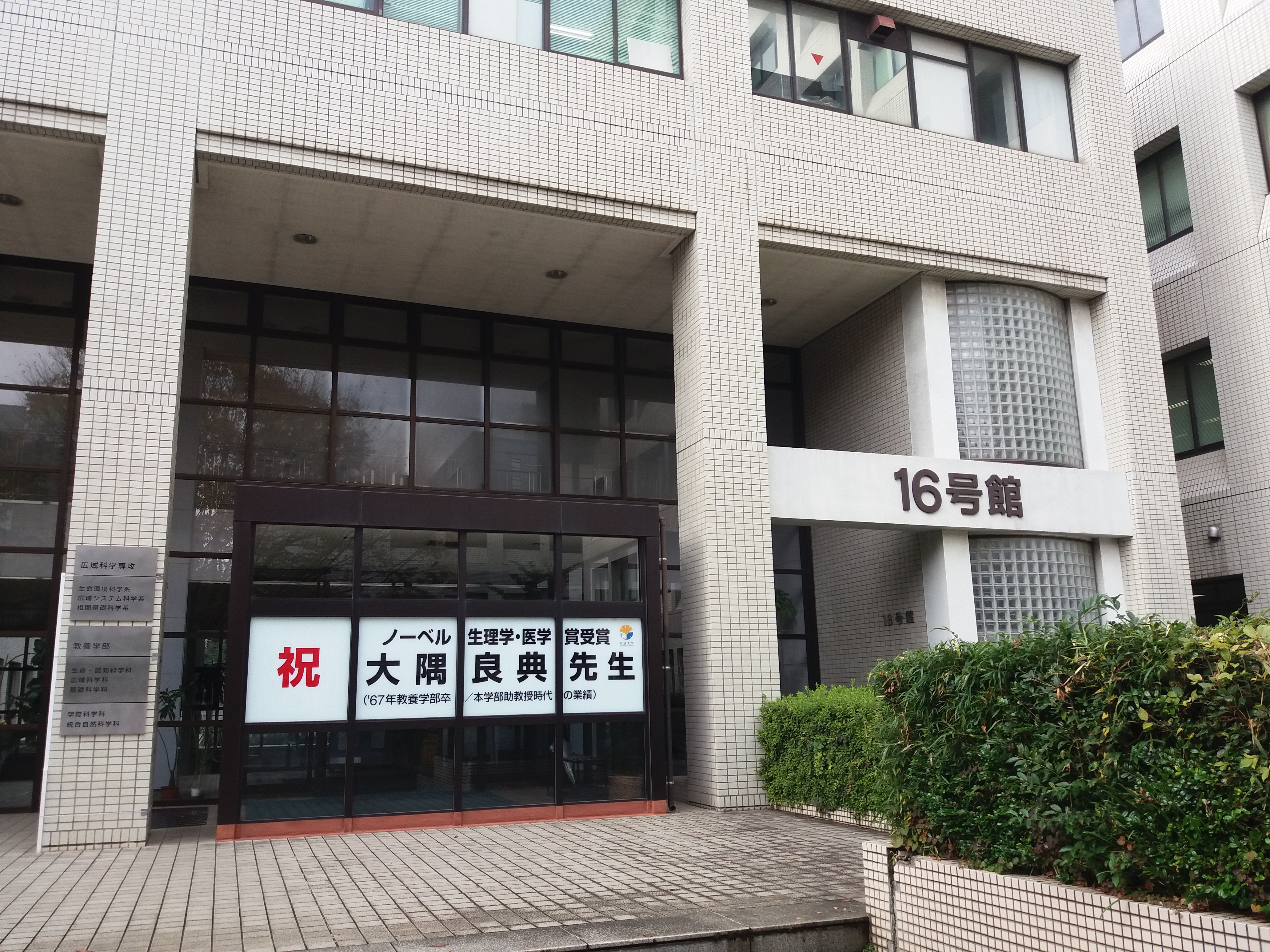 2016年10月、大隅良典氏がノーベル医学・生理学賞を受賞することが発表された。大隅氏の出身学科は駒場の基礎科学科（現・統合自然科学科）であり、ノーベル賞が贈られることになった論文のうち2本は駒場の助教授時代の仕事であるのだそうだ。駒場はそれはそれは大変な喜び様で、この経緯を踏まえてこのような横断幕が、統合自然科学科とその大学院である広域科学専攻相関基礎科学系の建物の入口に掲げられた。